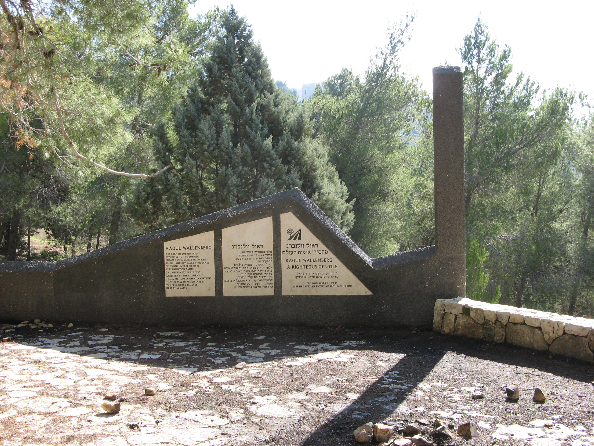 Raul Walanberg Memorial near Yad Vashem, Jerusalem